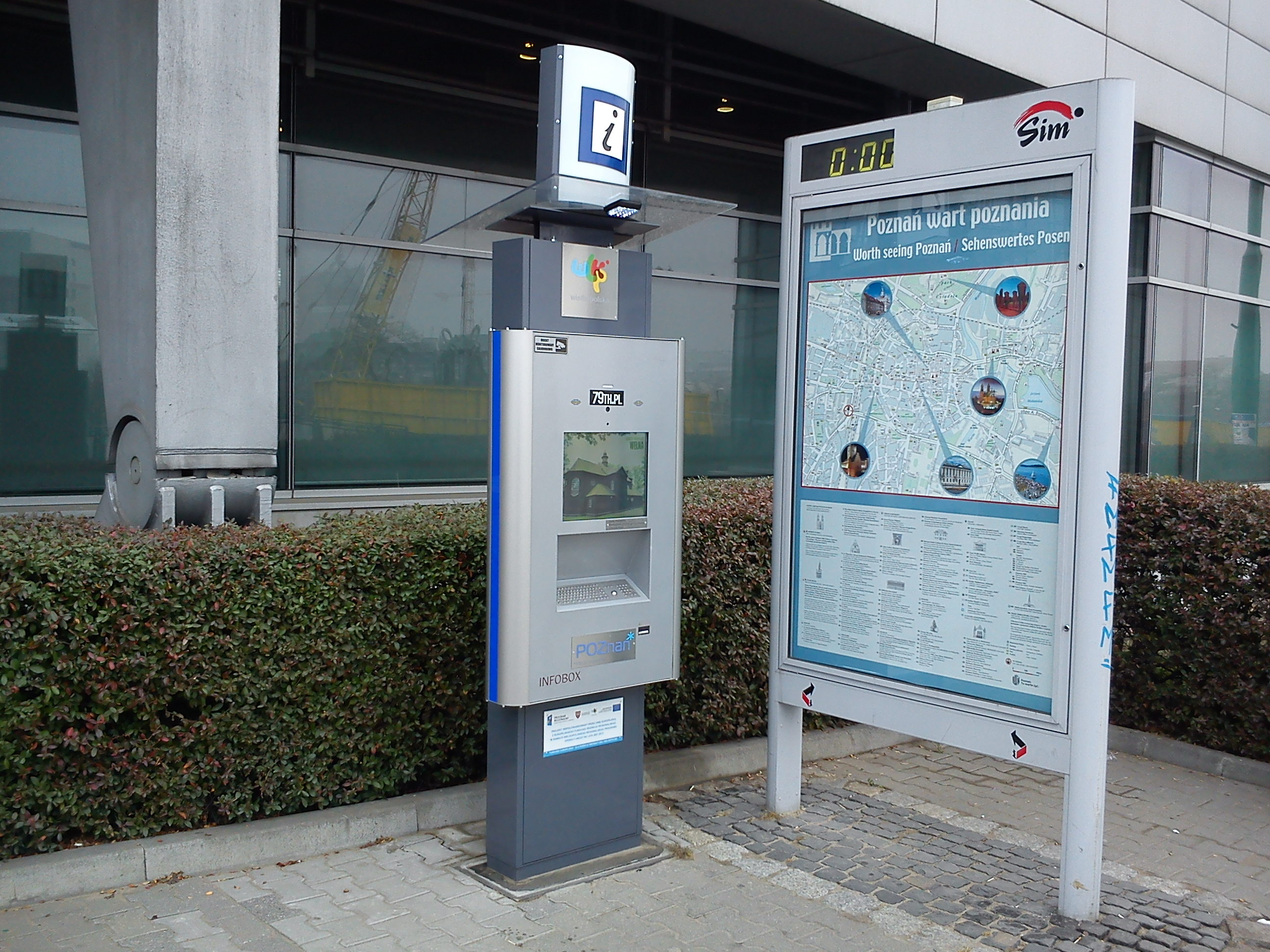 Infokiosk, Poznań, MTP, Roosevelta Street.